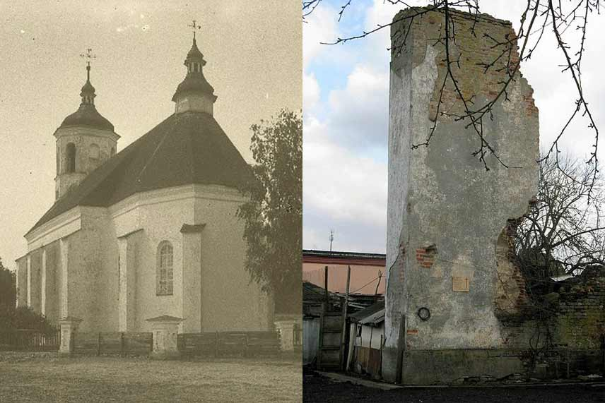 Беларуская (тарашкевіца): Маскалізацыя (русіфікацыя) Вялікага Княства Літоўскага. Места Клецак Наваградзкага павету. Фарны касьцёл, помнік архітэктуры рэнэсансу: аўтэнтычны выгляд і па руйнаваньні савецкімі ўладамі